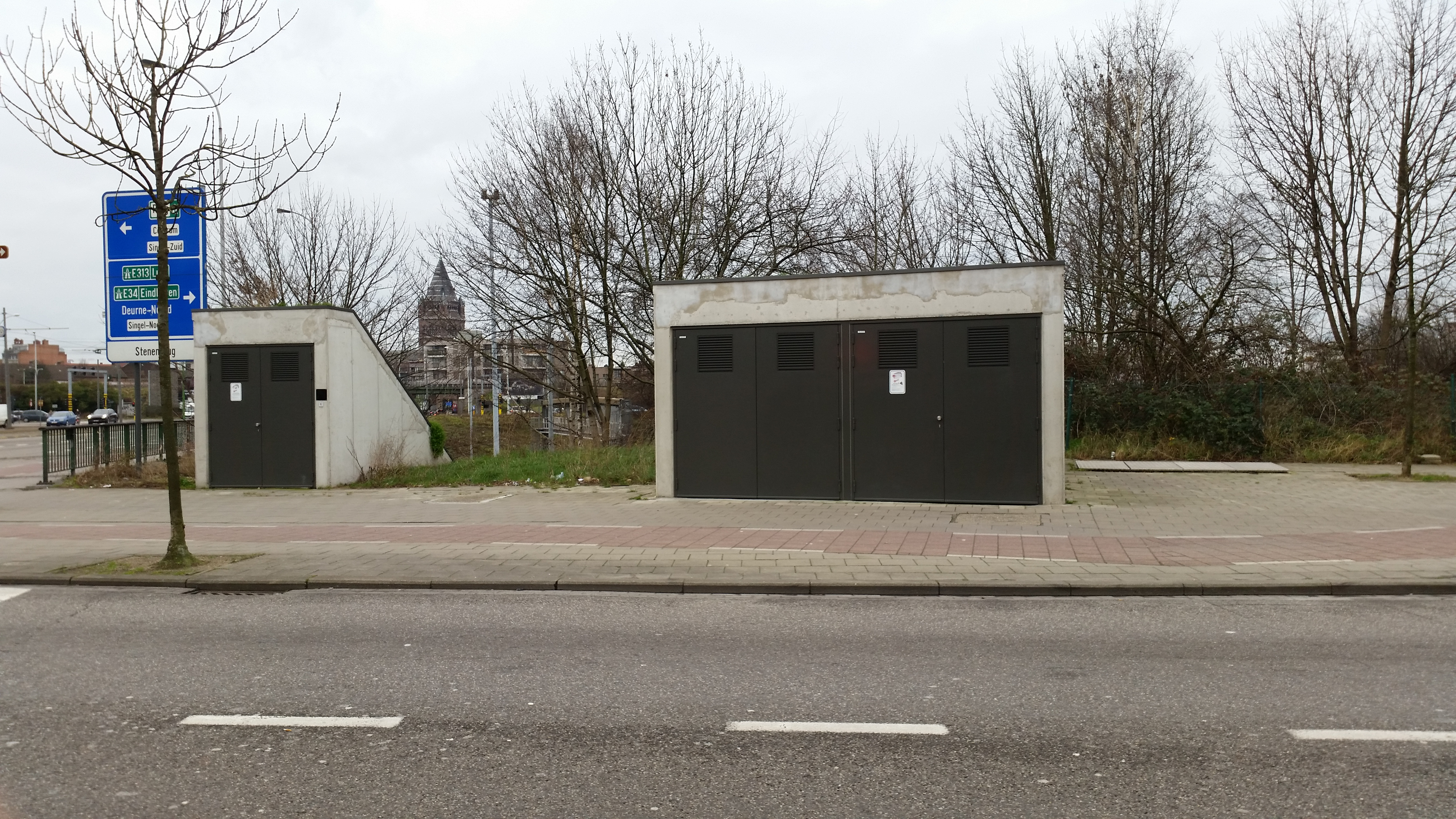 Intrarea în stația fantomă Collegelaan.